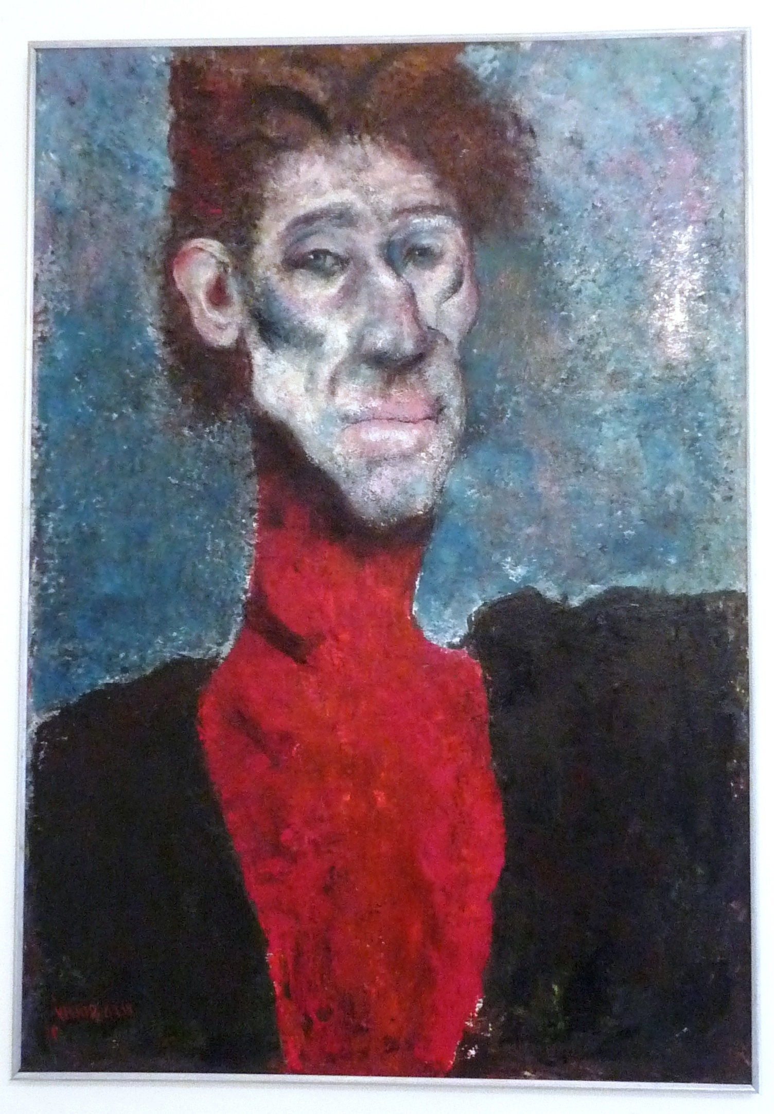 Vladimír Suchý obraz 5